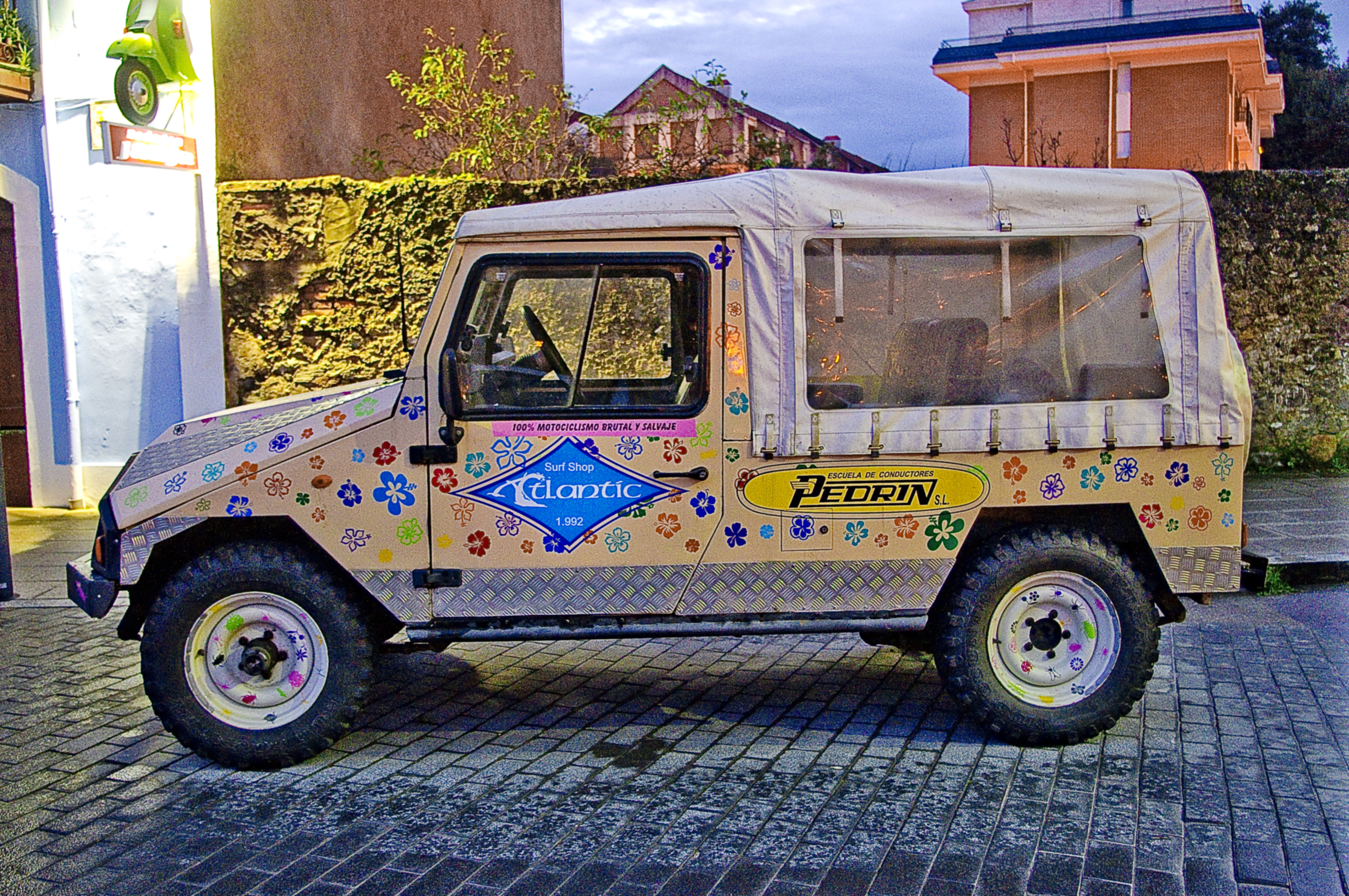 1992 UMM Alter